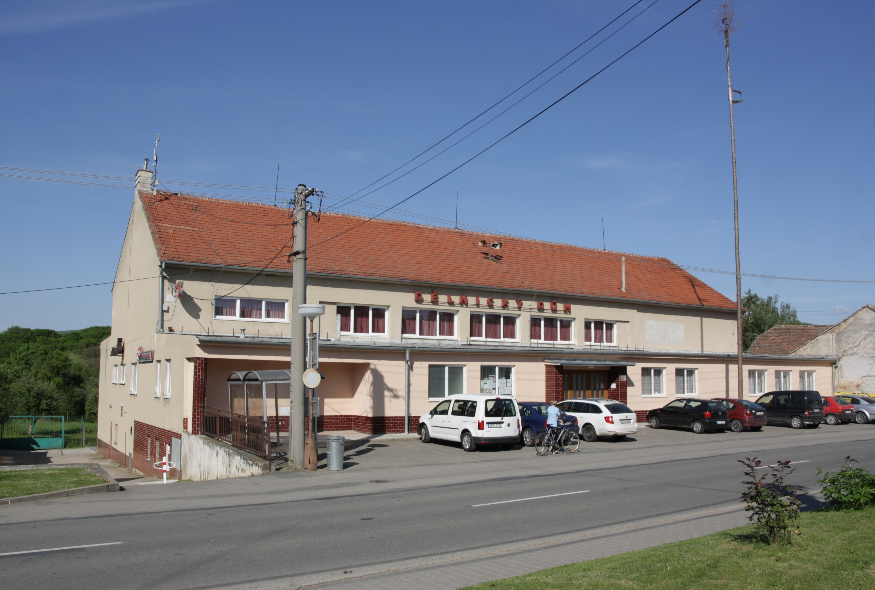 Otnice - Dělnický dům čp. 351